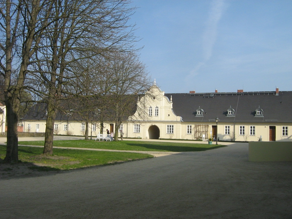 Marstall im Park Muskau (Niederschlesischer Oberlausitzkreis, Sachsen)